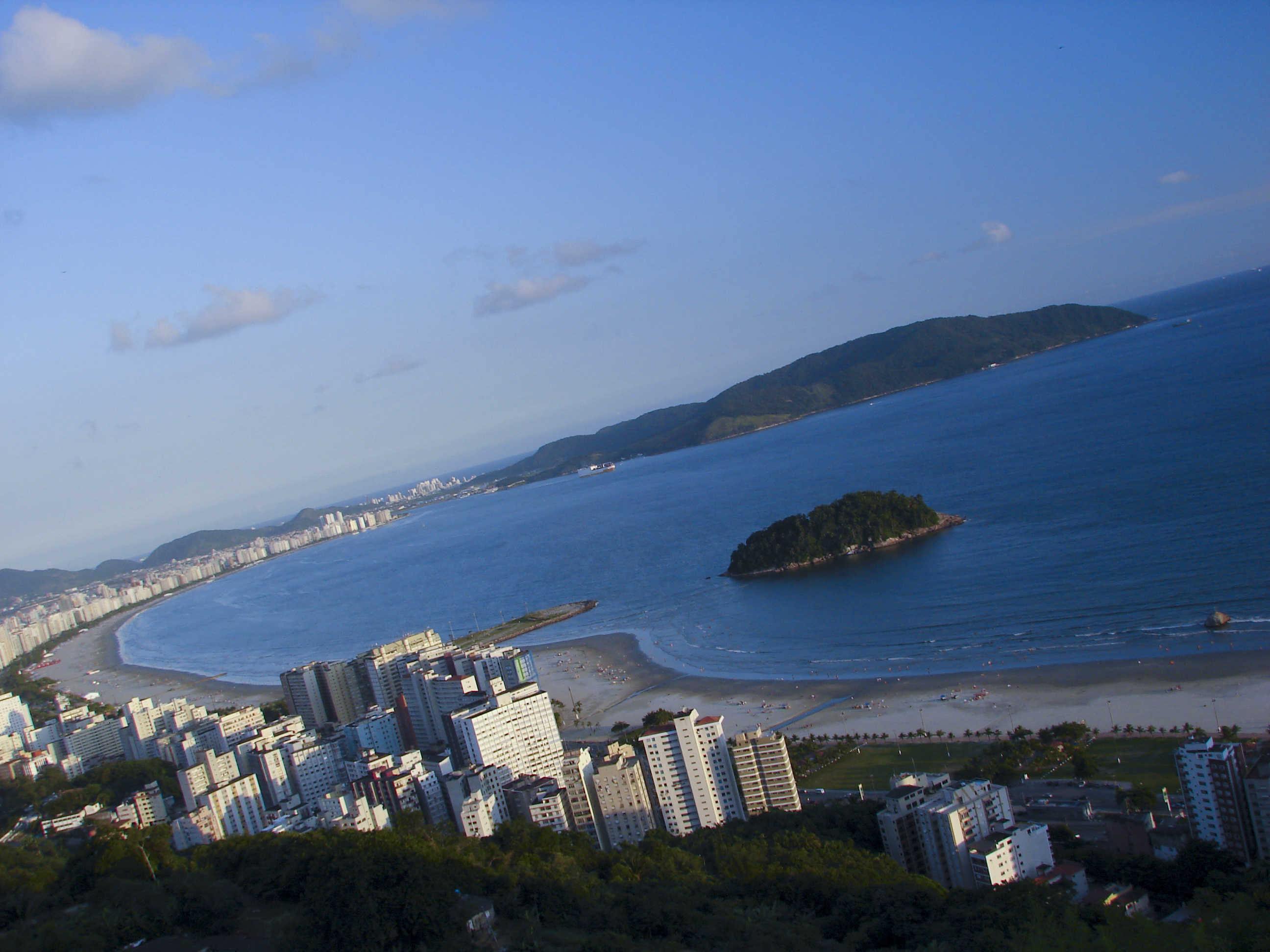 Santos, Brazil